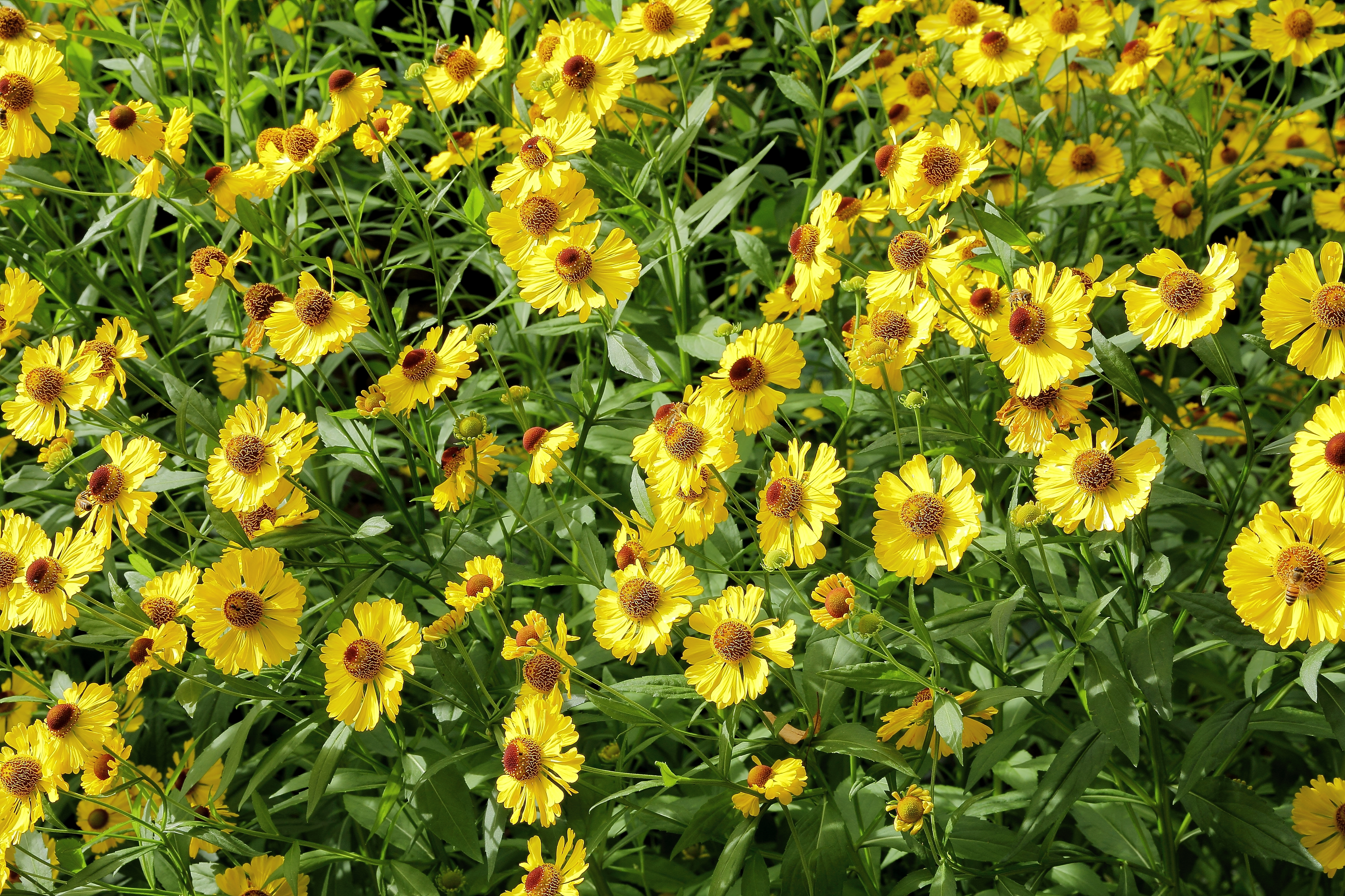 Helenium autumnale i Västerås botaniska trädgård.